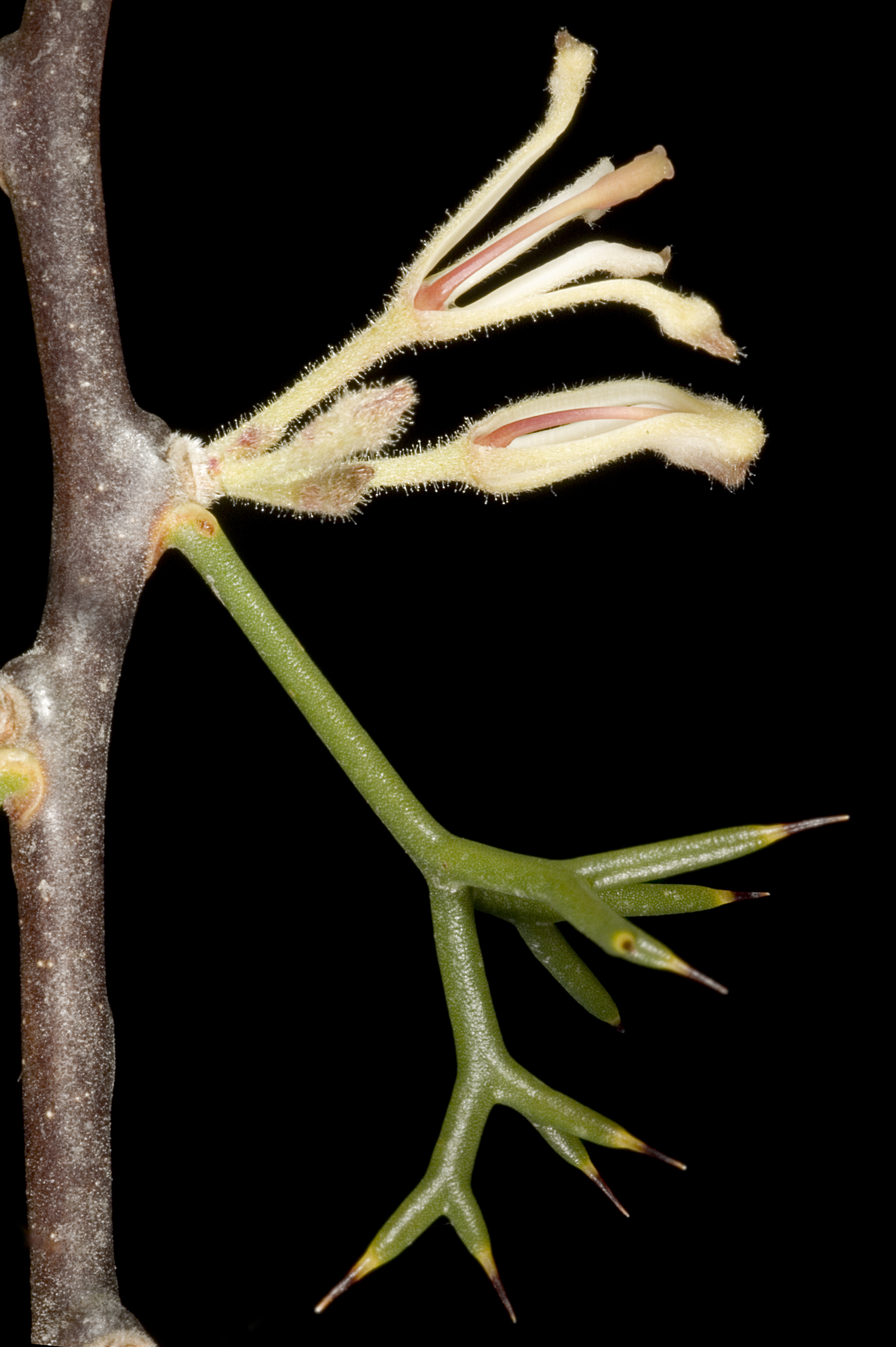 KRT3525